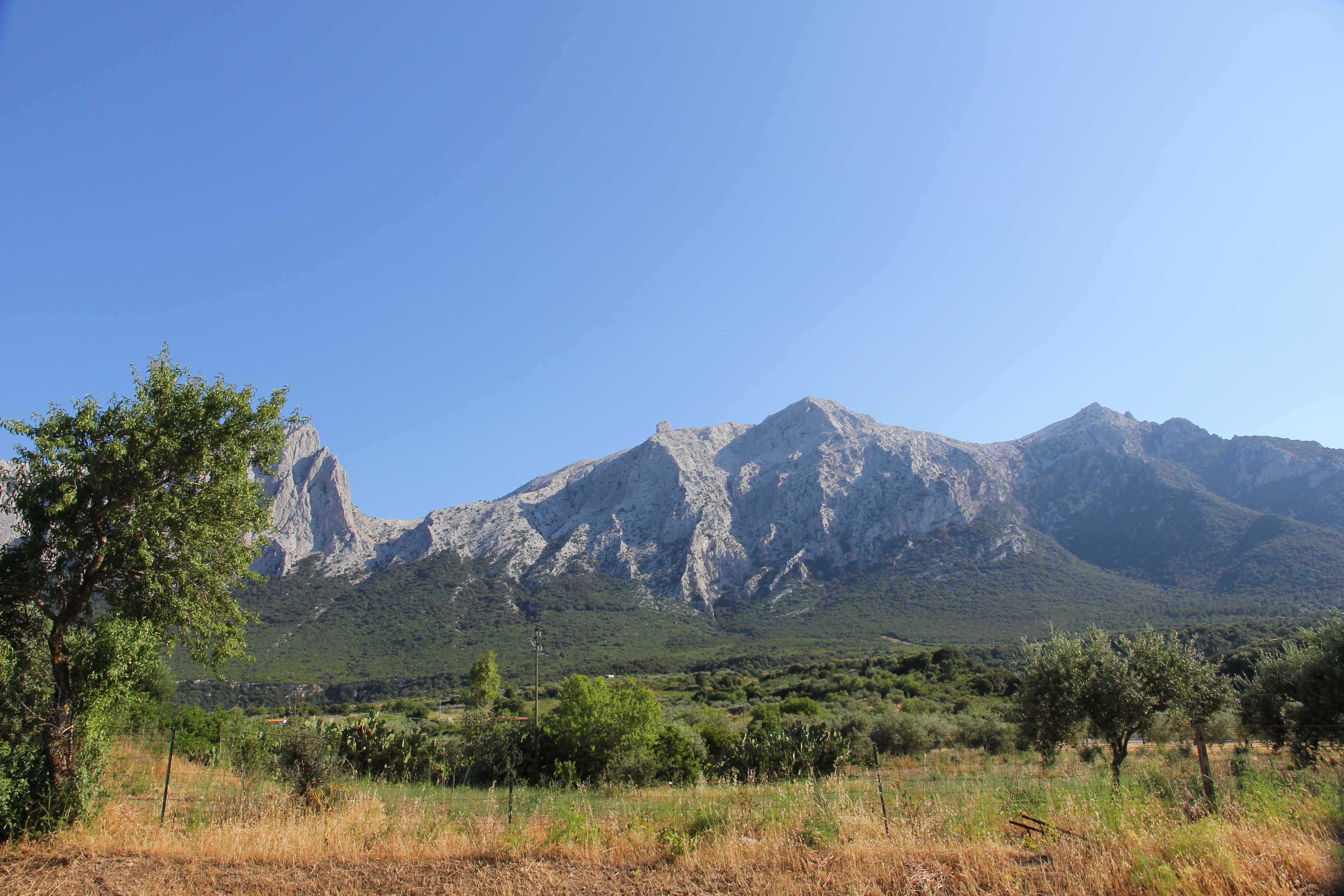 Oliena - Supramonte